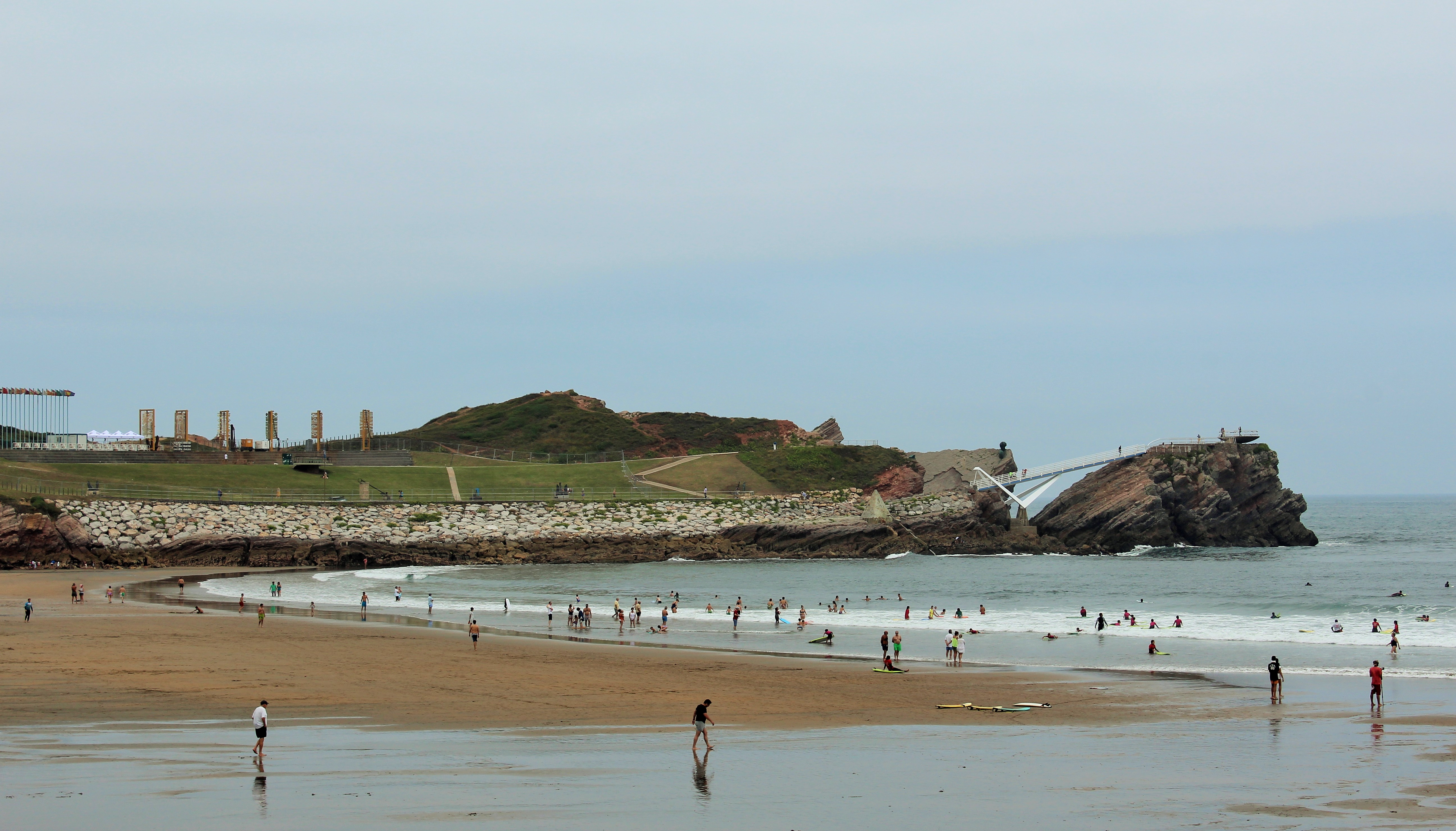 La Peñona en el extremo oeste de la Playa de Salinas-Castrillón-Asturias